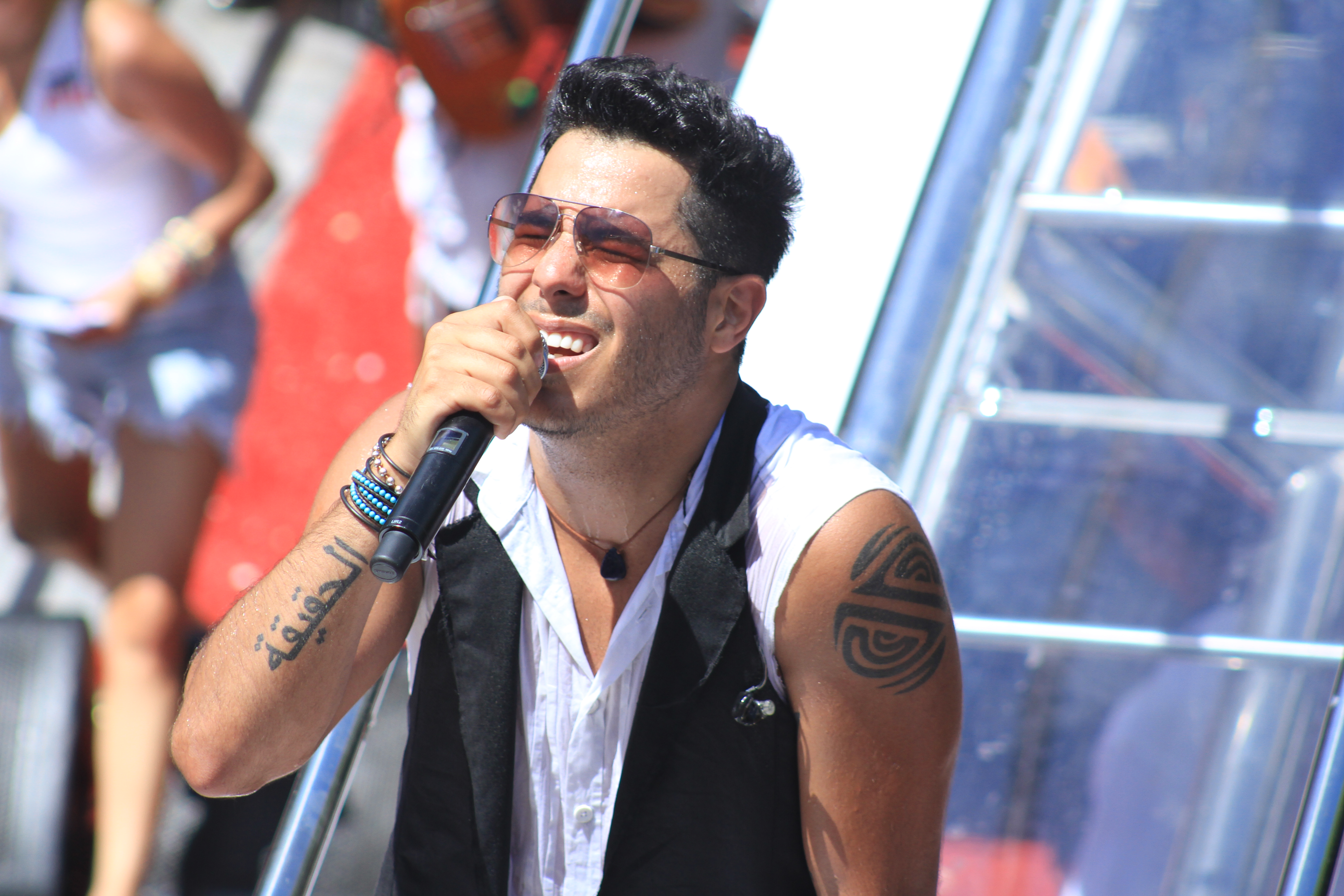 Bloco Inter com Tomate no Circuito Osmar em (21.02). Foto: Tatiana Azeviche - Setur